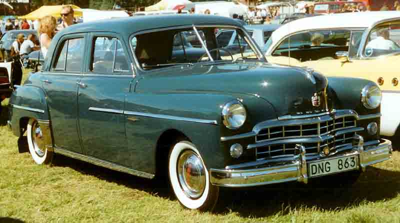 Dodge Coronet 4-Door Sedan 1949